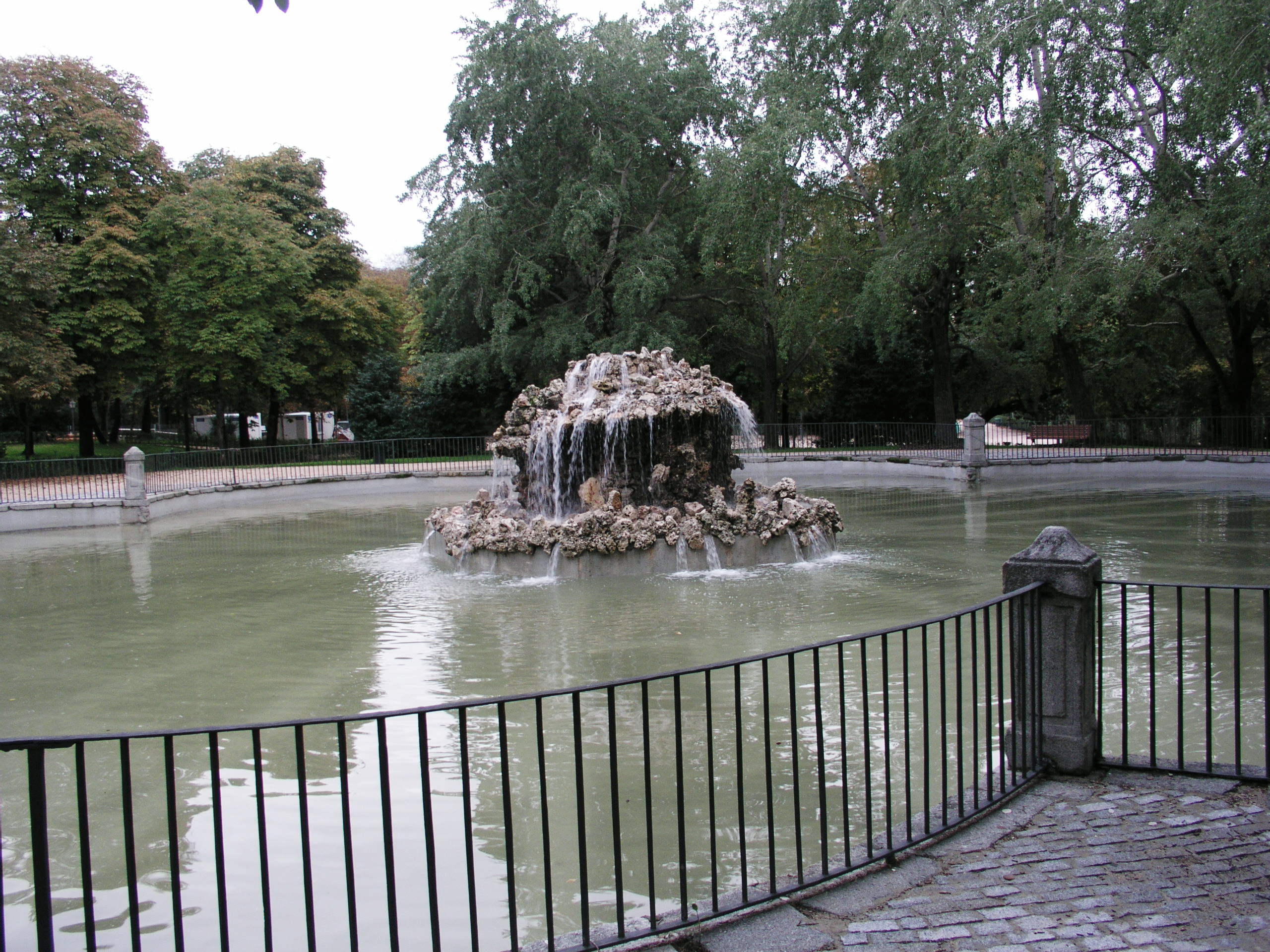 Jardines del Buen Retiro, Madrid, Spain. Estanque de las Campanillas.